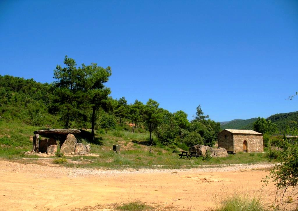 Área del dolmen de Sòls de Riu i la ermita románica de Santa Eulalia de Pomañons (s. XI), en La Torre de Rialb (La Baronia de Rialb, Prepirineo catalán)